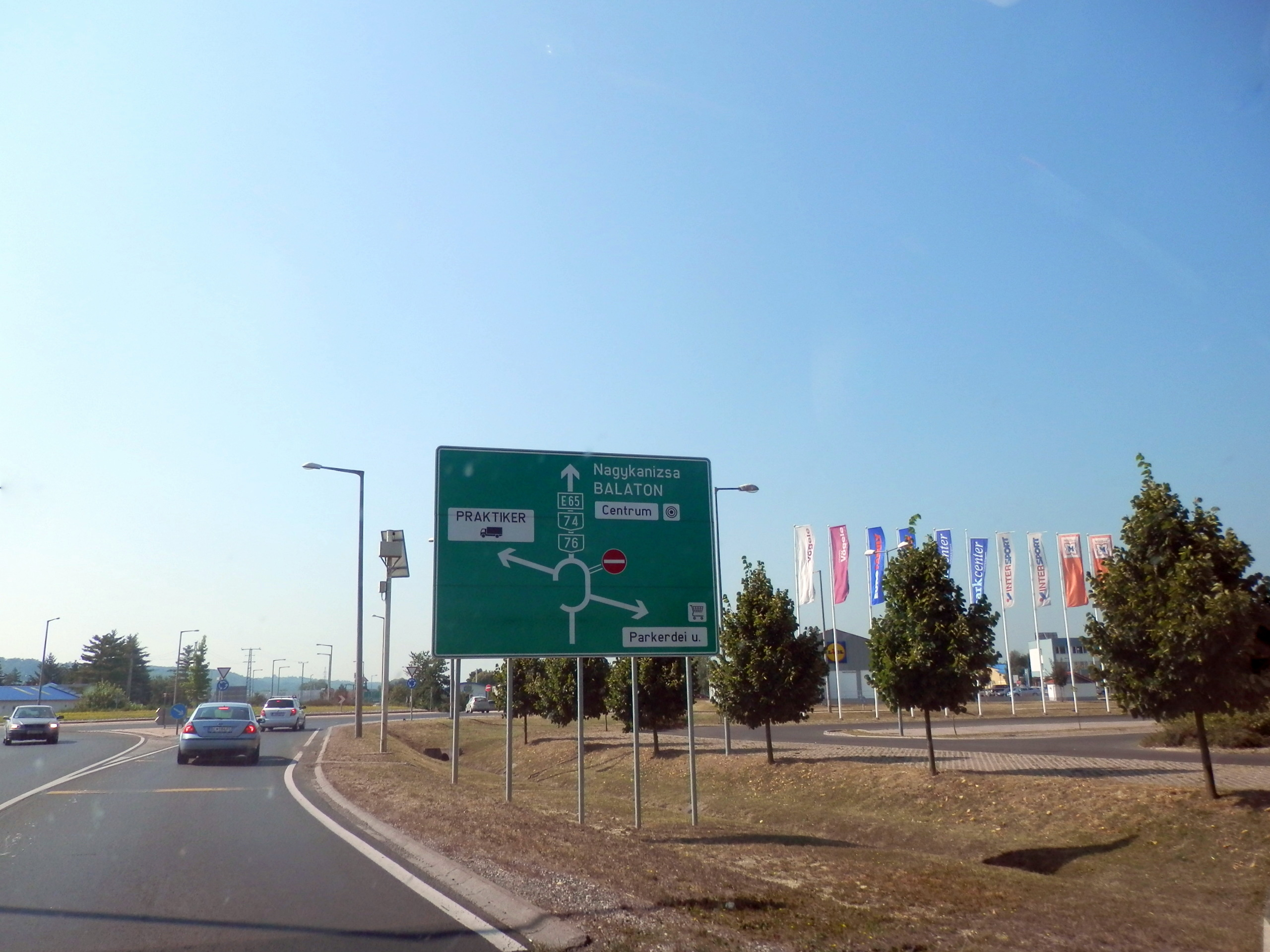 Obec Zalaegerszeg. Maďarsko, leto 2013.